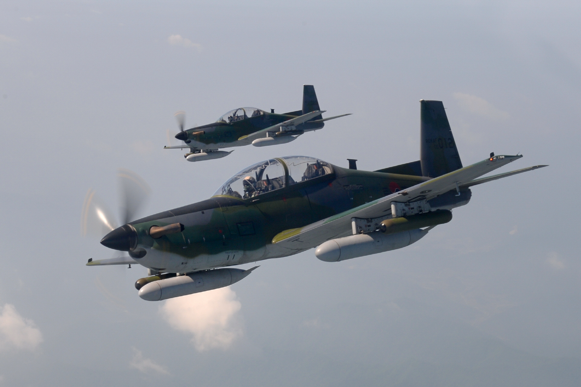 공군 제8전투비행단의 KA-1 전술통제기 편대가 10월 24일(금), 쾌청한 강원도 가을하늘을 누비며 비행임무를 수행하고 있다. KA-1 전술통제기는 국산 기본훈련기 KT-1에 로켓탄과 기관총으로 무장한 경공격기다. KT-1의 페루 수출형인 KT-1P의 초도 납품식이 최근 페루 라스팔마스 공군기지에서 거행되기도 했다.